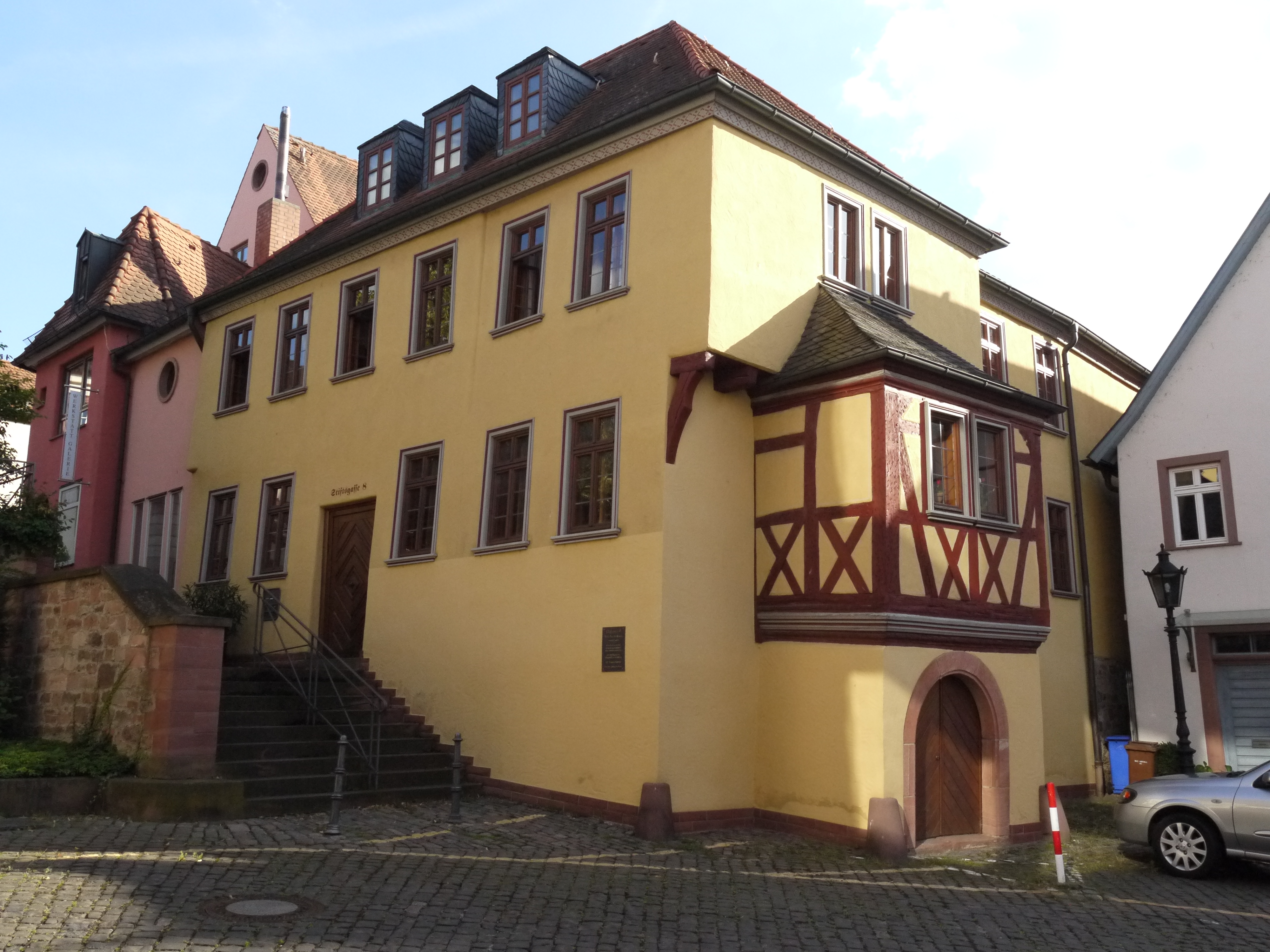 Stiftsgasse 8, in Bauteilen ältestes Gebäude Aschaffenburgs, denkmalgeschützt